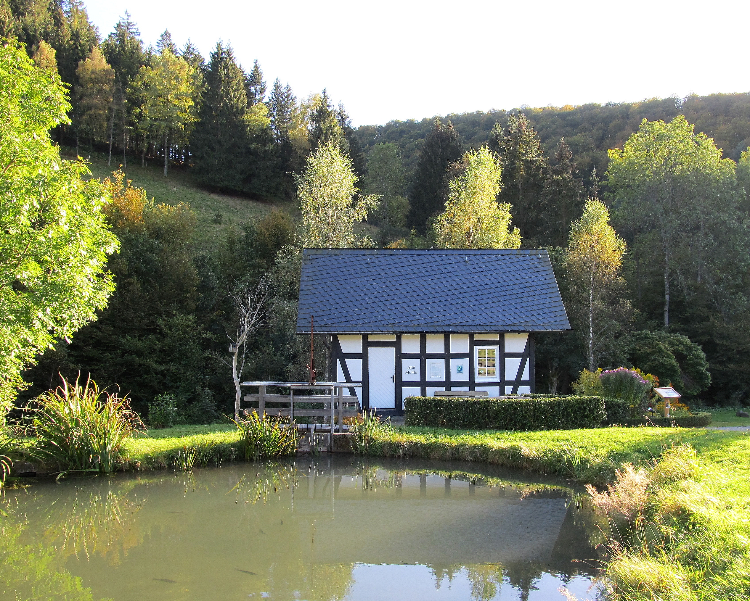 This is a photograph of an architectural monument., no. 204 Ehemalige Mühle Halberstadt in Schmallenberg-Latrop; das Gebäude wurde im Jahr 1739 als Eisenhammer vom Kloster Grafschaft errichtet; seit 2003 befindet sich ein Waldarbeitermuseum in dem Gebäude